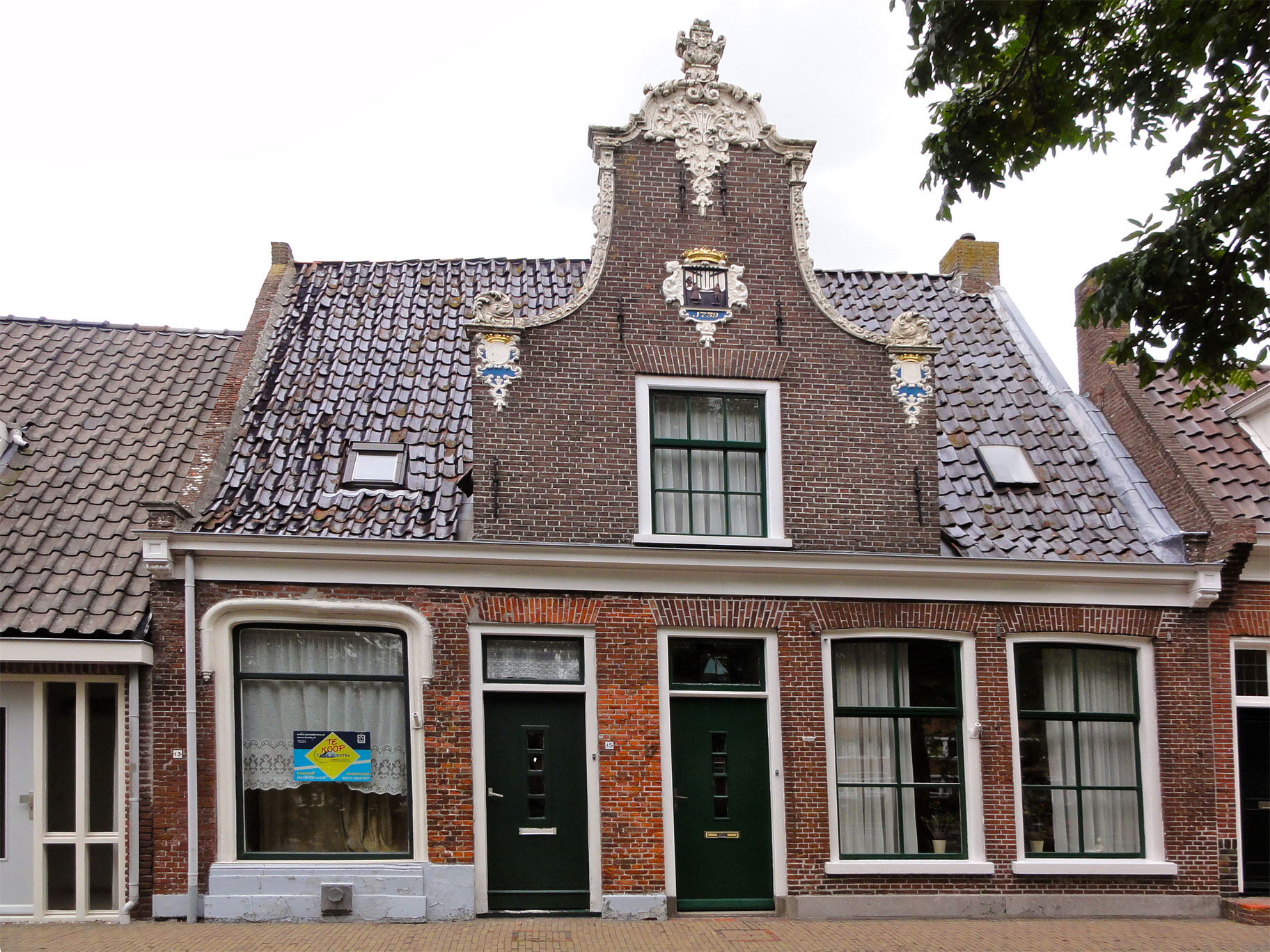 Halvemaanspoort 15 en 17 Dokkum, rijksmonument